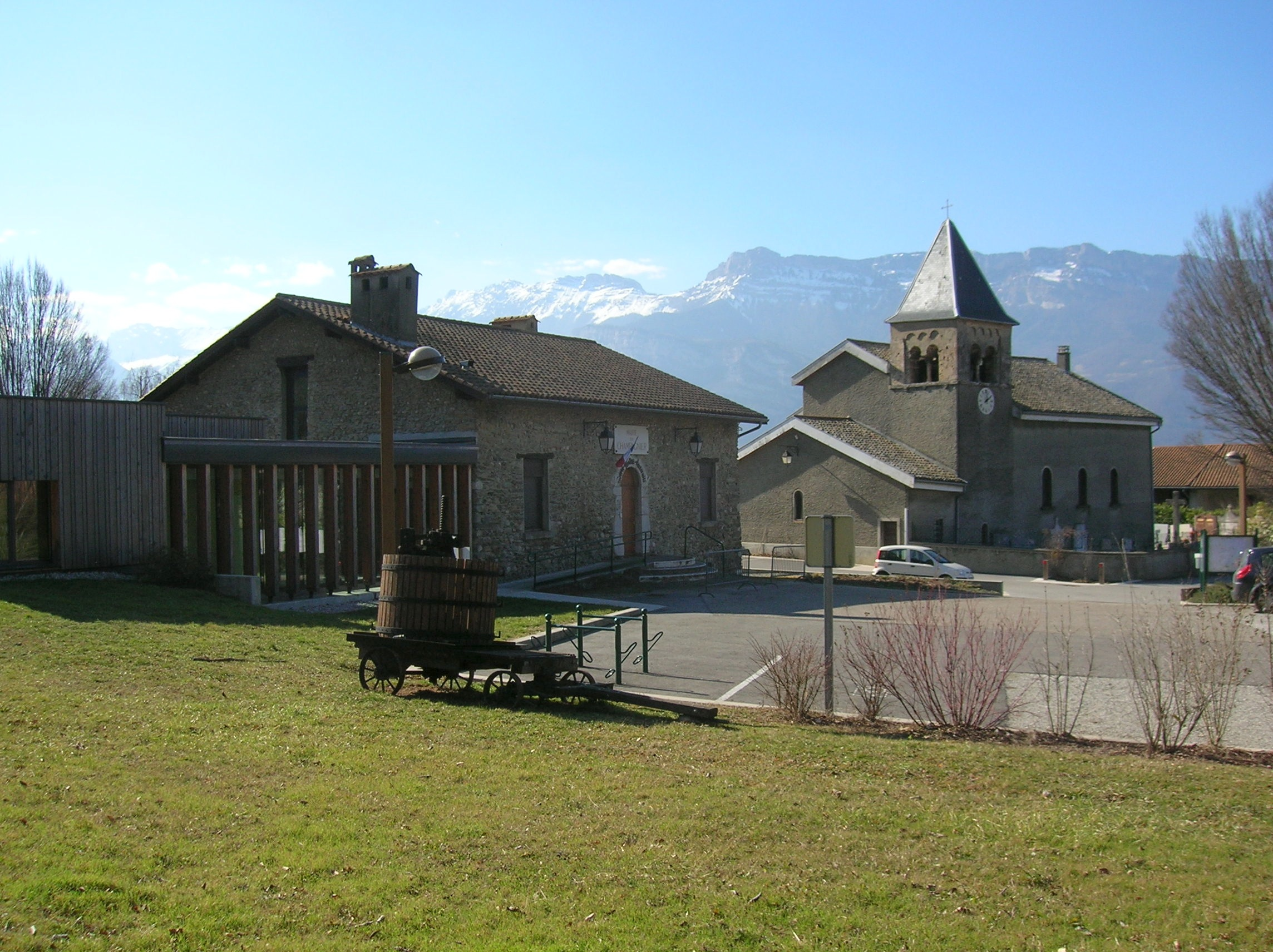 La mairie et l'église depuis le Parc Gabriel Velten. Champagnier, Isère, AuRA, France.